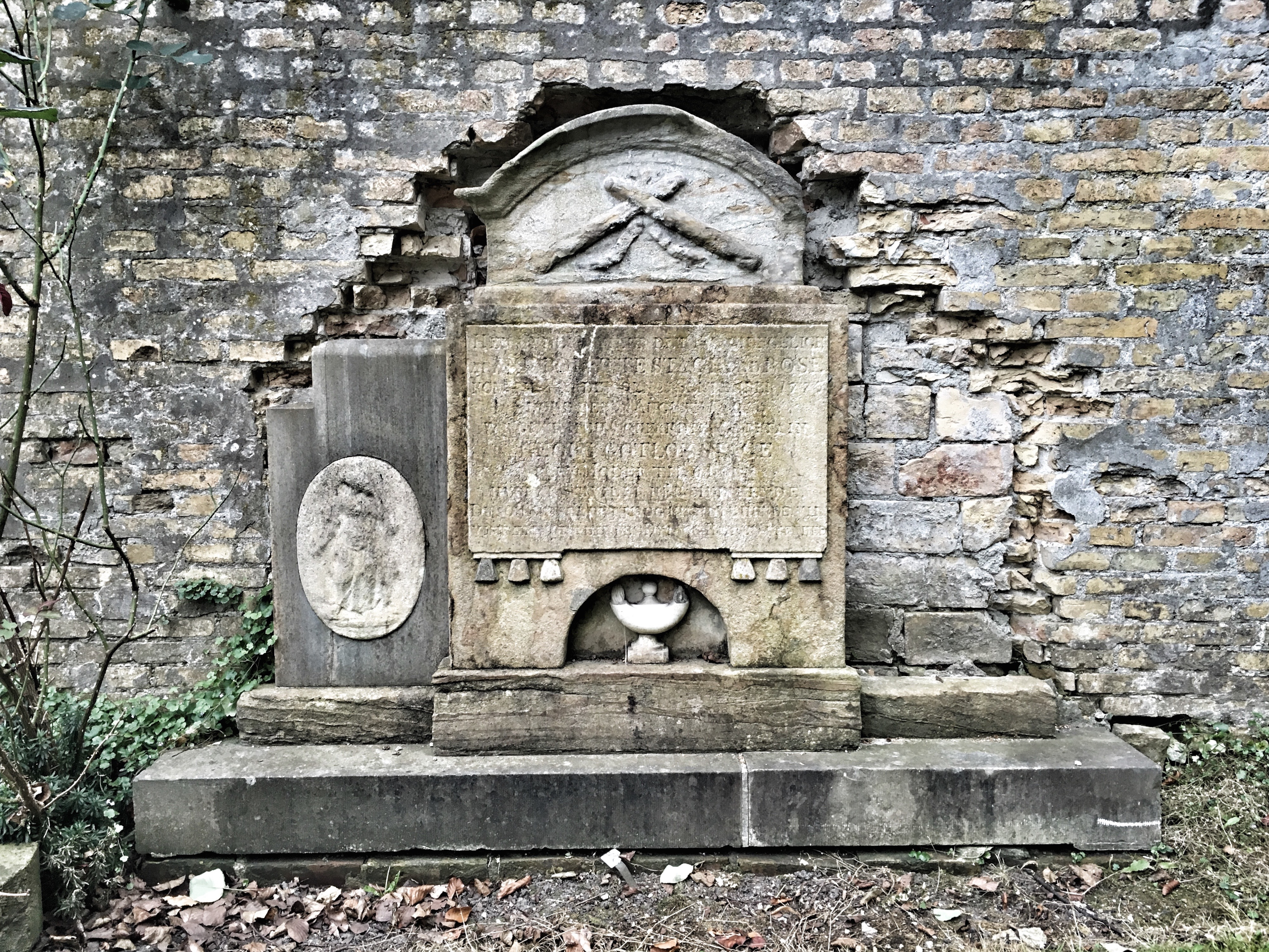 Gravsted på Assistens Kirkegård, formentlig hvor Mette Marie Rose er begravet, Nørrebro, København